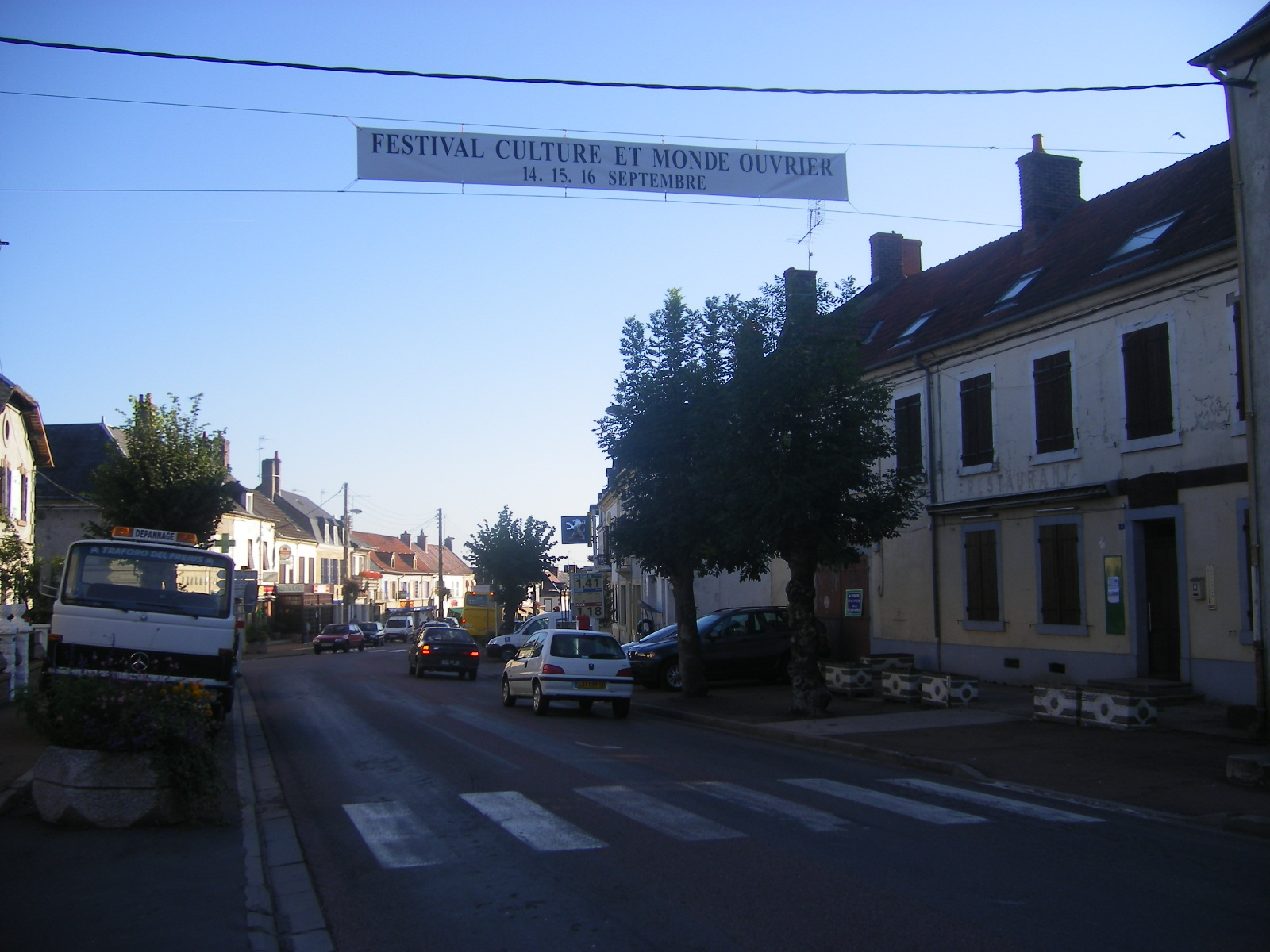 La Machine